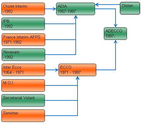 Source: Lax1 License: Public Domain